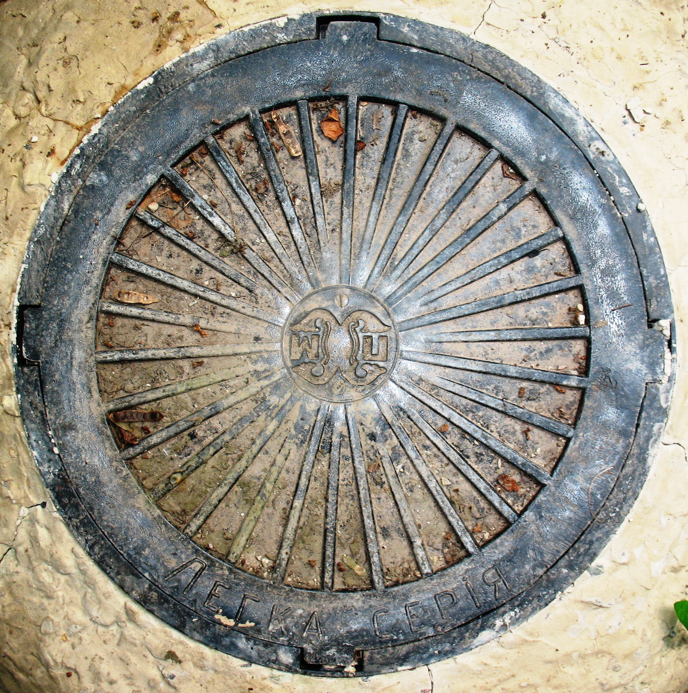 Пластиковая крышка канализационного люка, производства Харьковского пластмассового завода (ХПМ) конца 1980-х г. либо 1990-х. В Харькове, Пушкинский въезд. Лёгкая серия. Нижний паз частично расплавлен. Никогда не располагаются на проезжей части, чтобы автомобили их не продавили. Данная крышка расположена на клумбе.